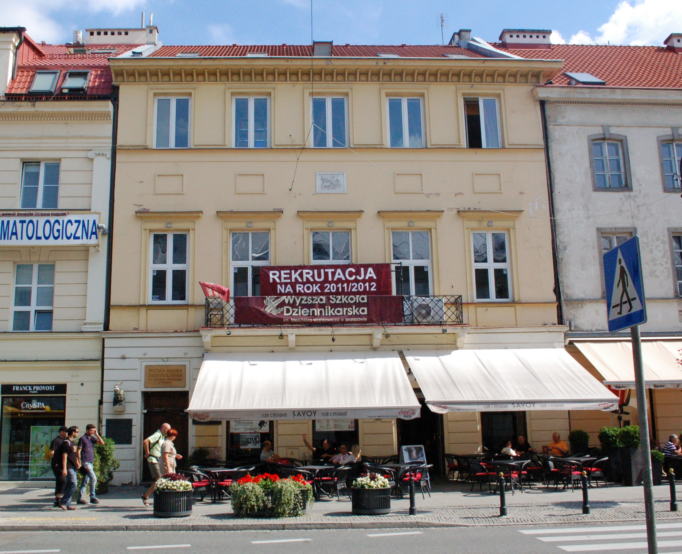 Former Hotel Savoy, Nowy Swiat, Warsaw